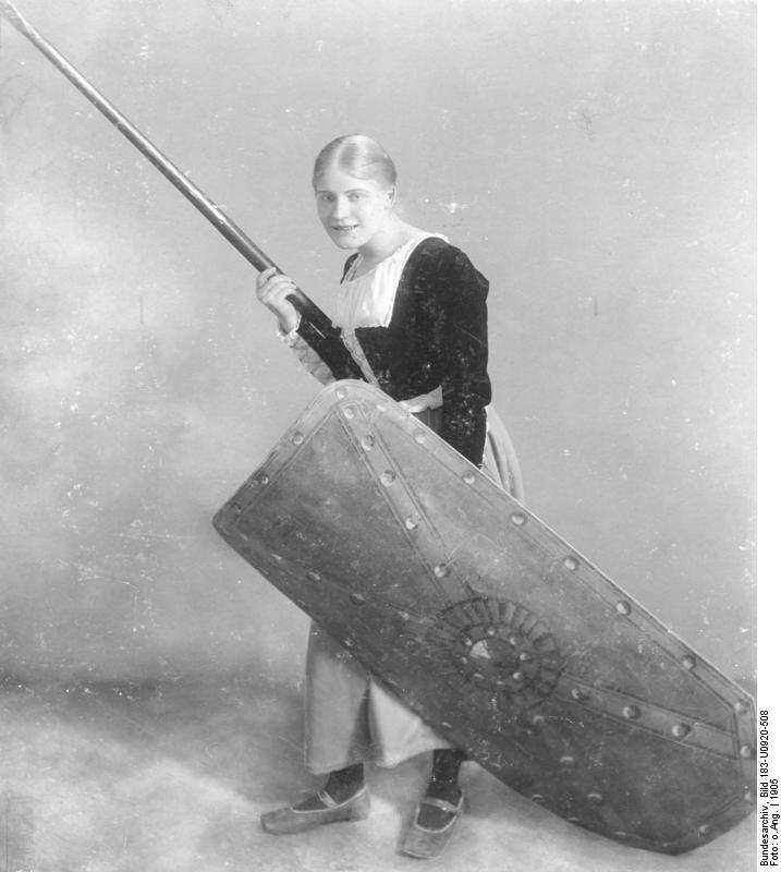 Lucie Höflich ADN-ZB/Archiv Lucie Fröhlich, Schauspielerin, geb. 20.2.1883 in Hannover, gest. 9.10.1956 in Westberlin. Die Schauspielerin Lucie Höflich als Kätchen in Heinrich von Kleists „Das Kätchen von Heilbronn“, aufgeführt im Deutschen Theater zu Berlin. (Aufn.: 1905)